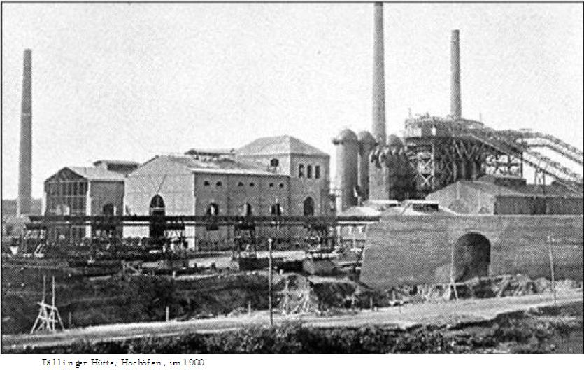 Ansicht um 1900 der Dillinger Hütte